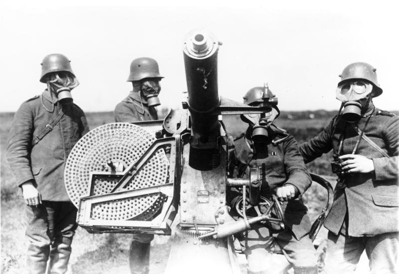 ADN-ZB/Archiv I.Weltkrieg 1914-18 Mit Gasmasken ausgerüstete Bedienungsmannschaft eines deutschen schweren Fla-MGs 8915-35 [Scherl Bilderdienst] Information added by Wikimedia users.Maxim Flak M14, M-Flak 37 mm, Bj. 1898 ? [1]